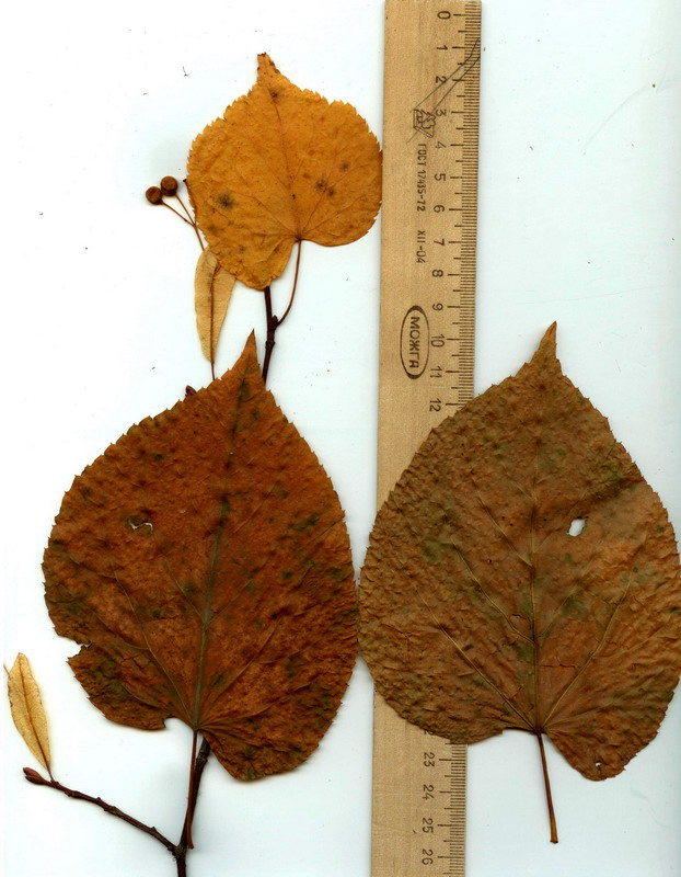 Фрагмент типового образца вида: часть с листьями и плодами. Окрестности г.Красноярска, у северной границы заповедника "Столбы" в долине ручья Каштак. 19.09.1990. Изотип, хранящийся в гербарии Сибирского федерального университета - KRSU.